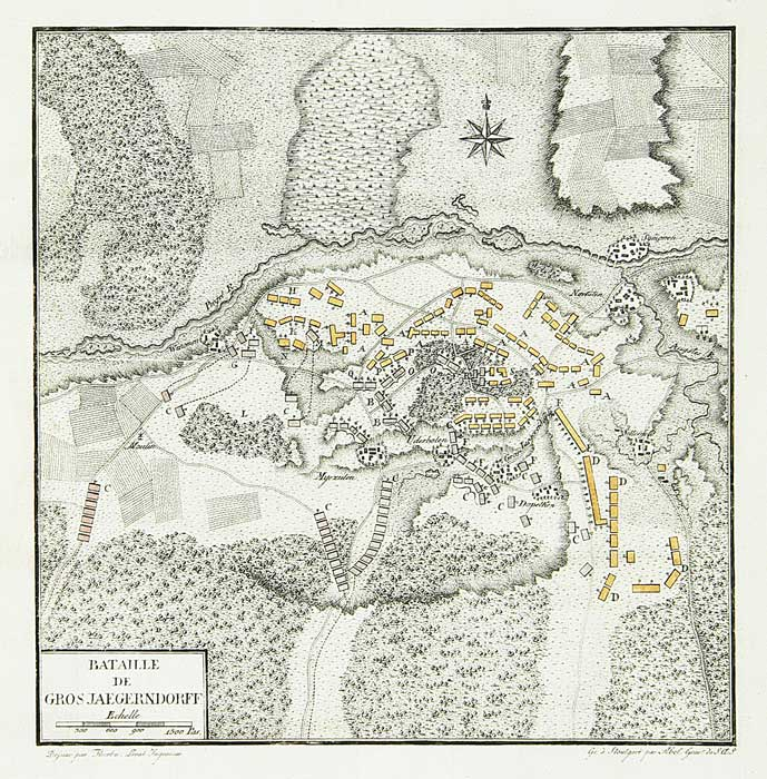 Схема битвы при Гросс-Егерсдорфе